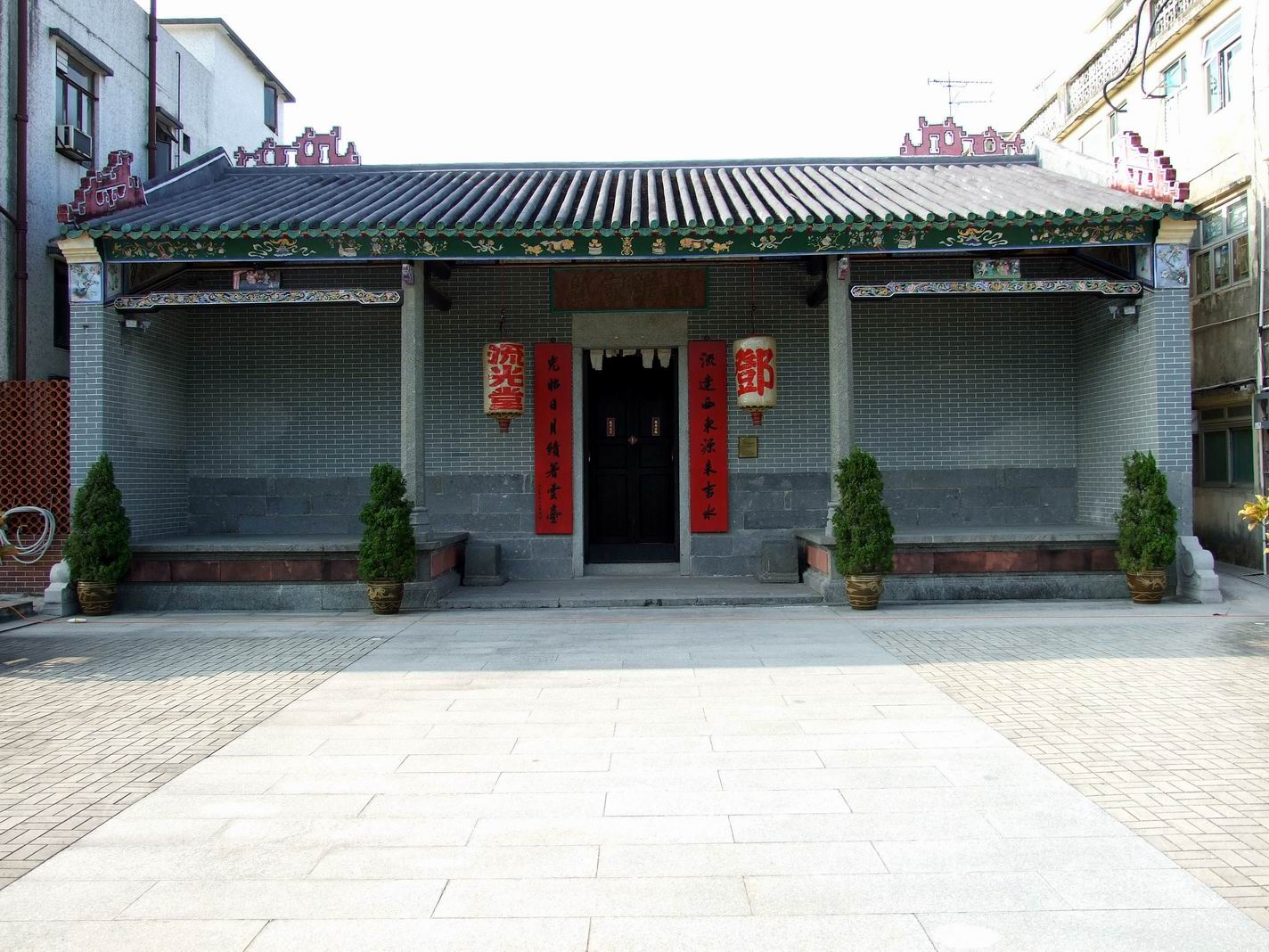 香港法定古蹟敬羅家塾